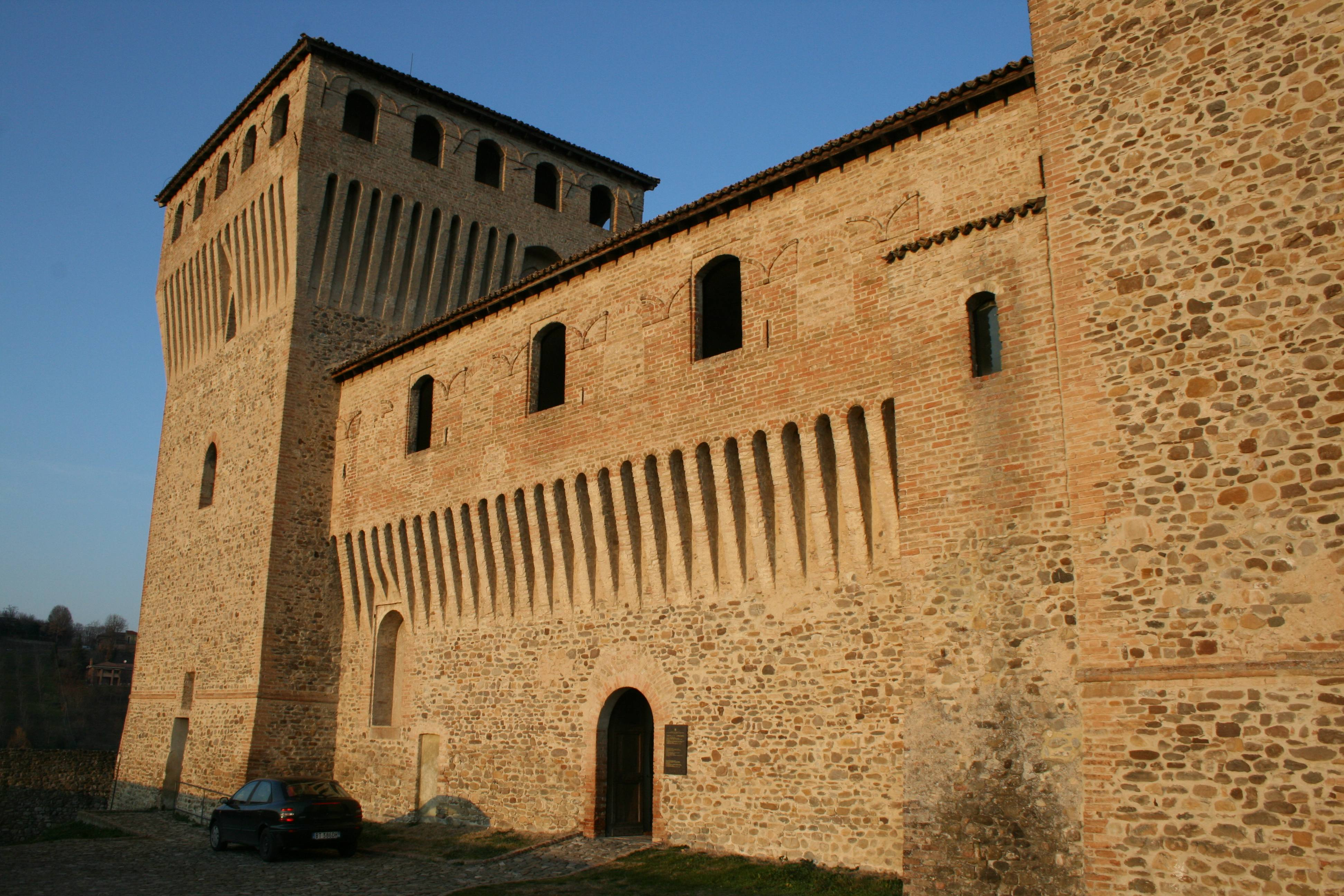 Castello di Torrechiara